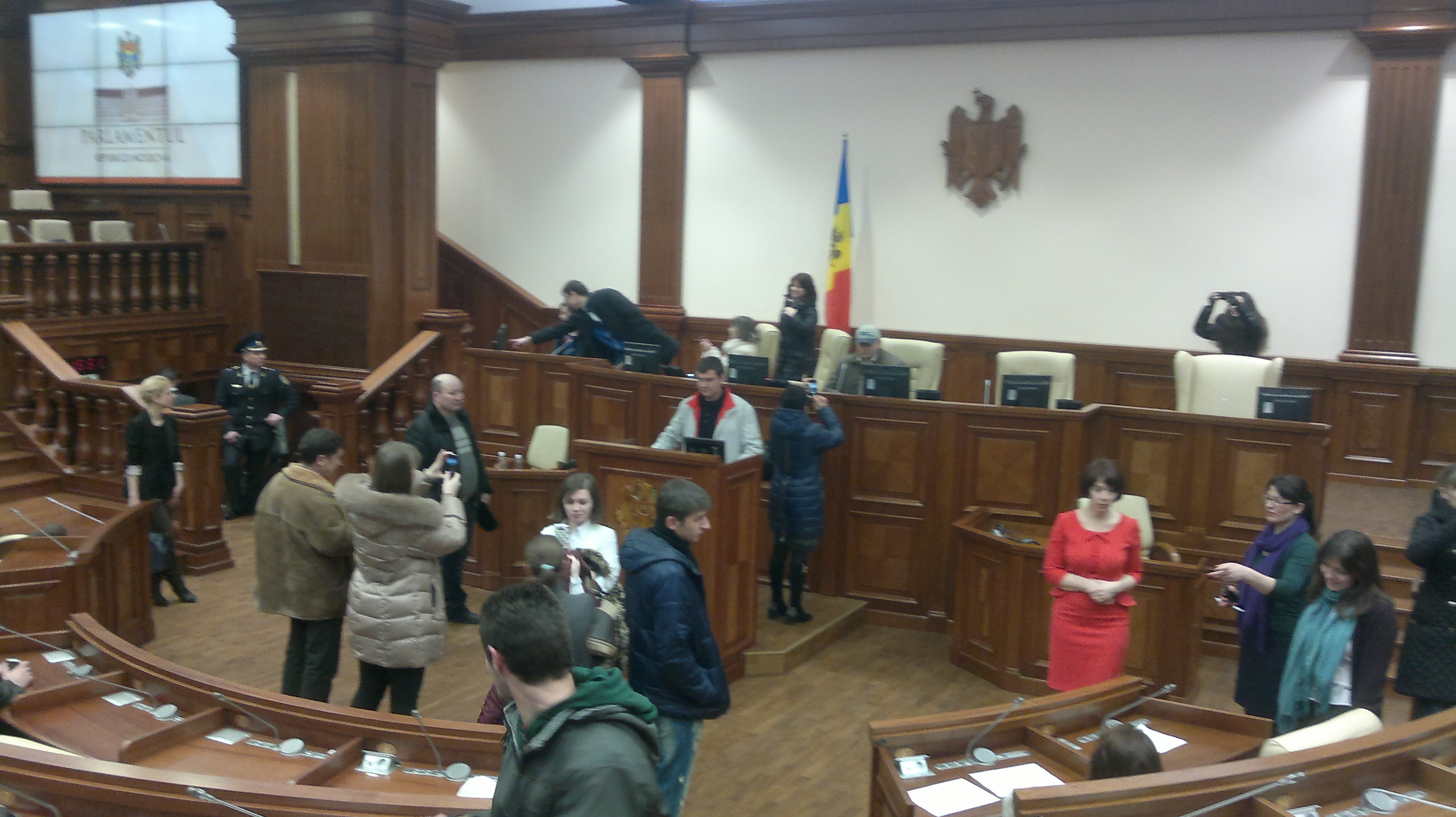 Interiorul Parlamentului Republicii Moldova (Ziua uşilor deschise)